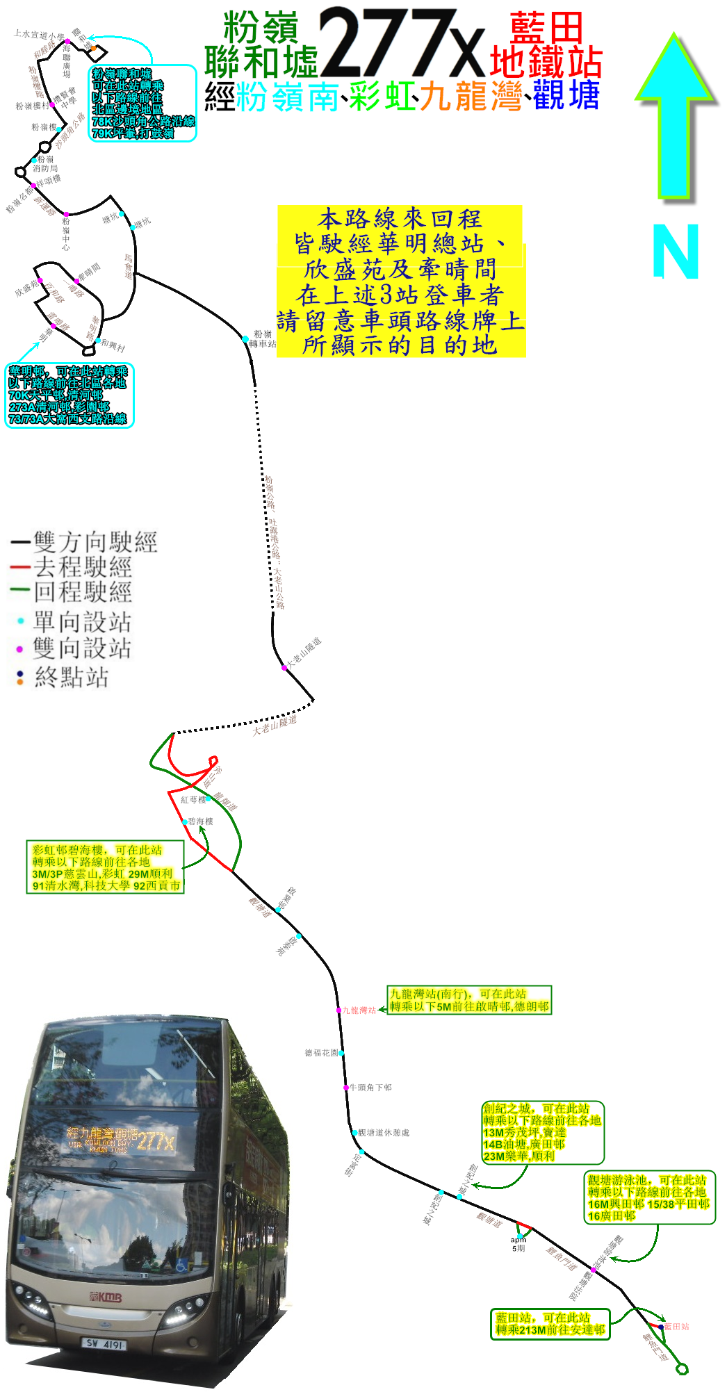 中文（香港）: 九巴277X線常規班次的走線圖